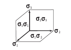 Base des bivecteurs de l'algèbre géométrique